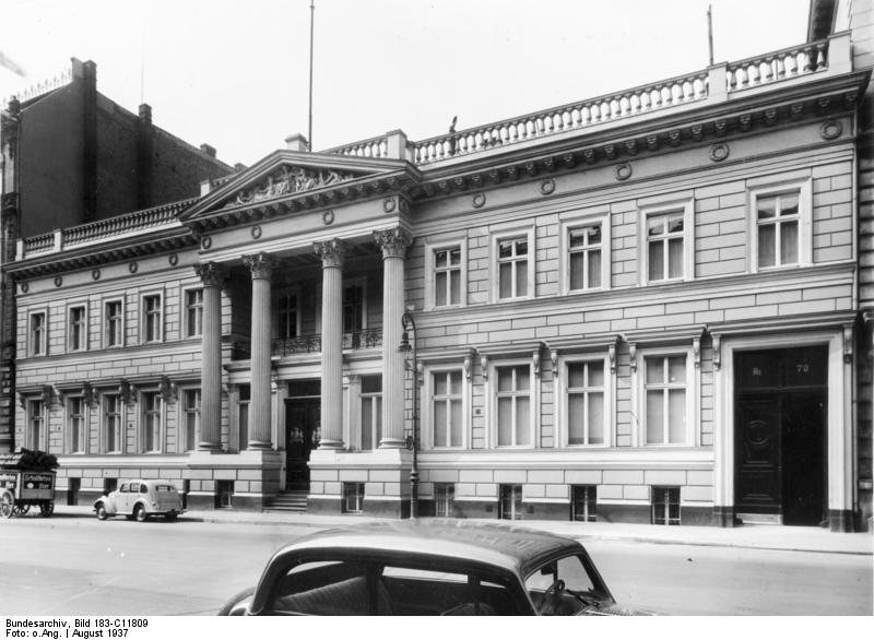 ADN-ZB/Archiv Berlin August 1937 Gebäude der Botschaft von Großbritannien in der Wilhelmstraße 70 (heute Otto-Grotewohl-Str.)